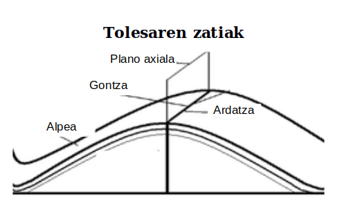 Tolesaren atalak euskaraz